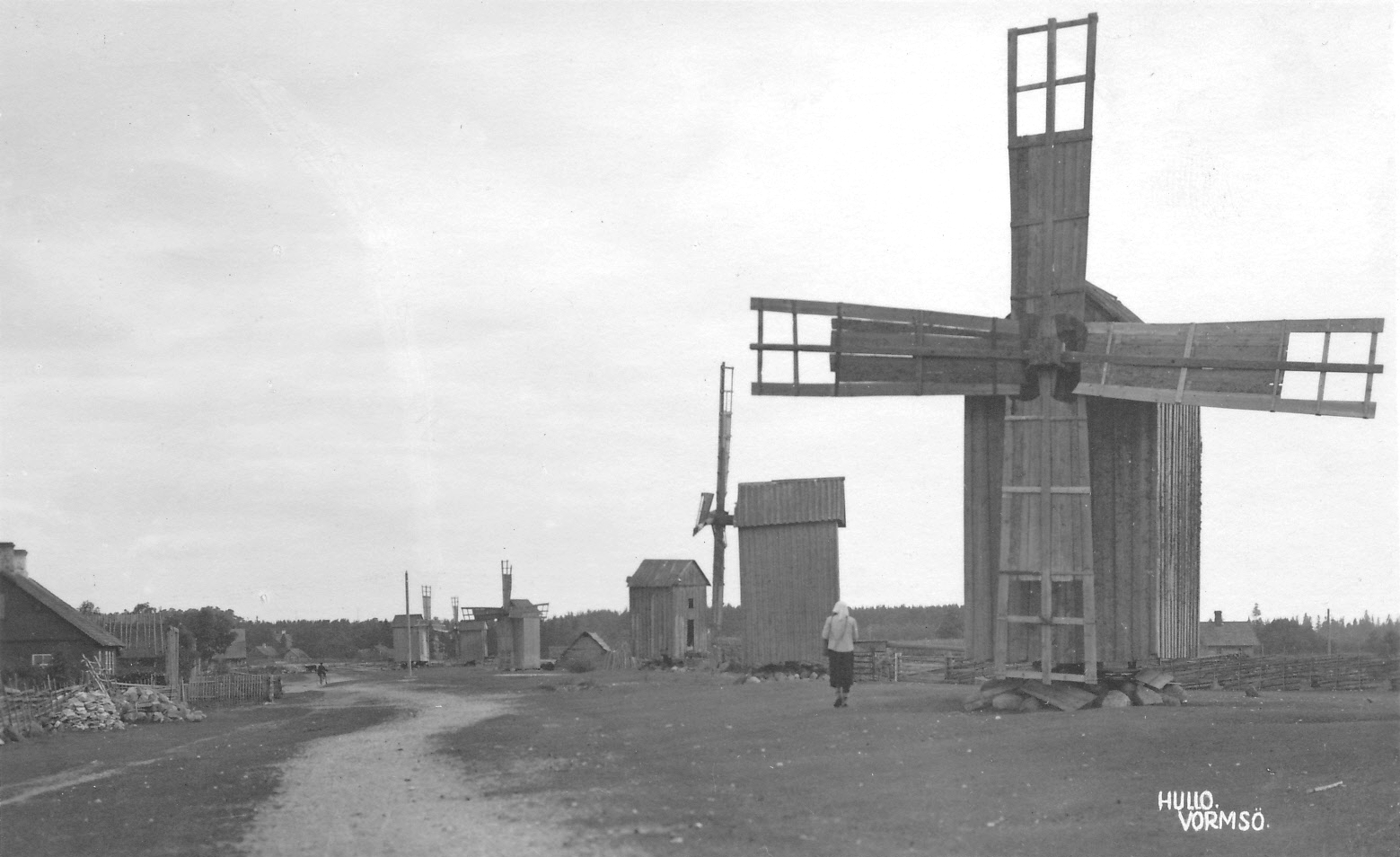 Vormsi Hullo tuulikud